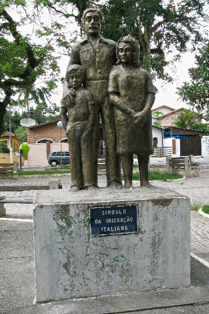 Estátua Imigrantes Italianos (Quiririm)